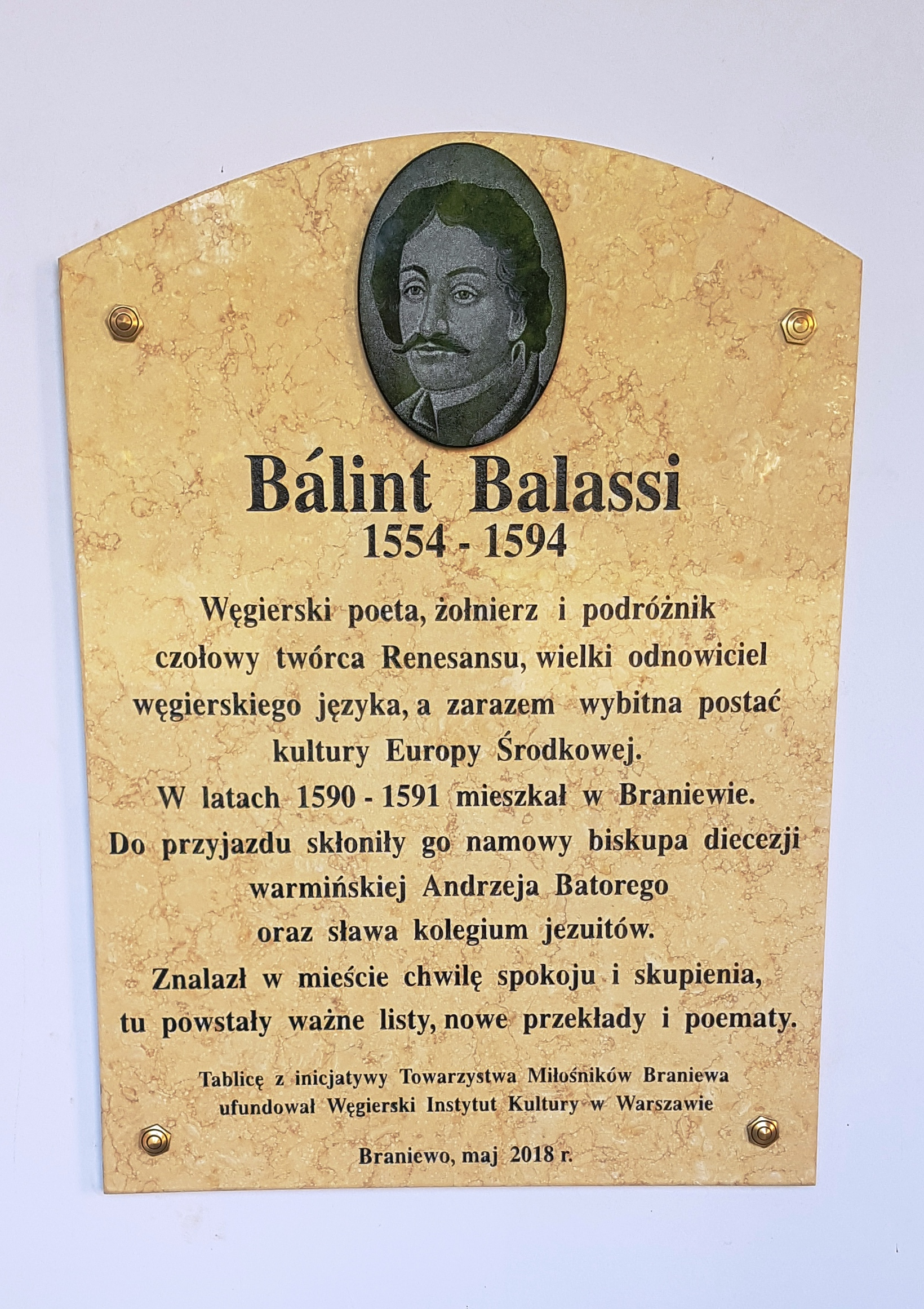 Bálint Balassi Kolegium Jezuitów w Braniewie tablica pamiątkowa 2018